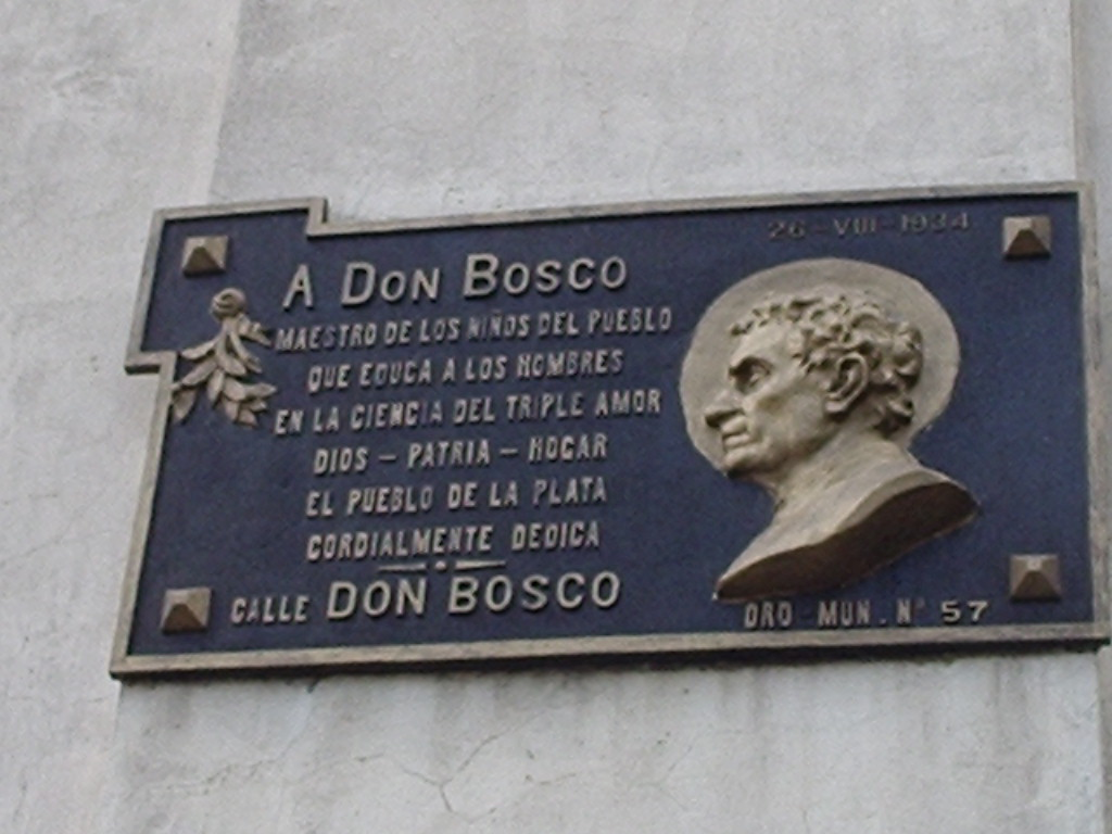 Homenaje a Don Bosco en la Ciudad de La Plata (Argentina). La Municipalidad de La Plata, impone el nombre de Don Bosco a la Calle 58, por Ordenanaza Municipal Nº 57 del año 1934.